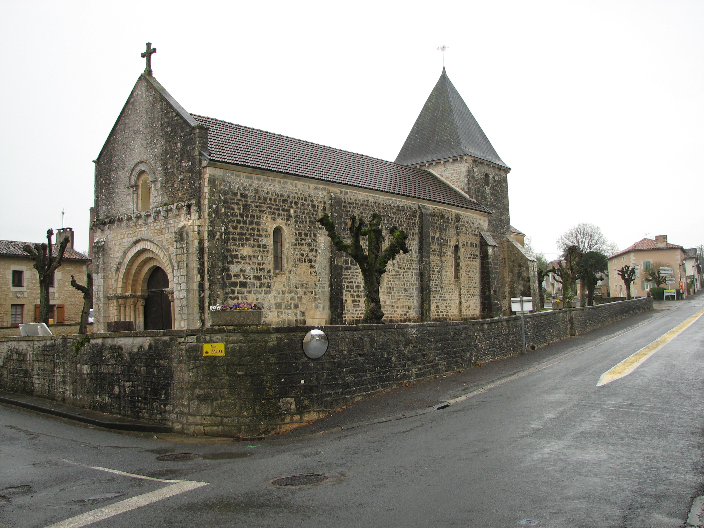 Eglise de Vaux-en-Couhé dans la Vienne Vaux-en-Couhé church in Vienne